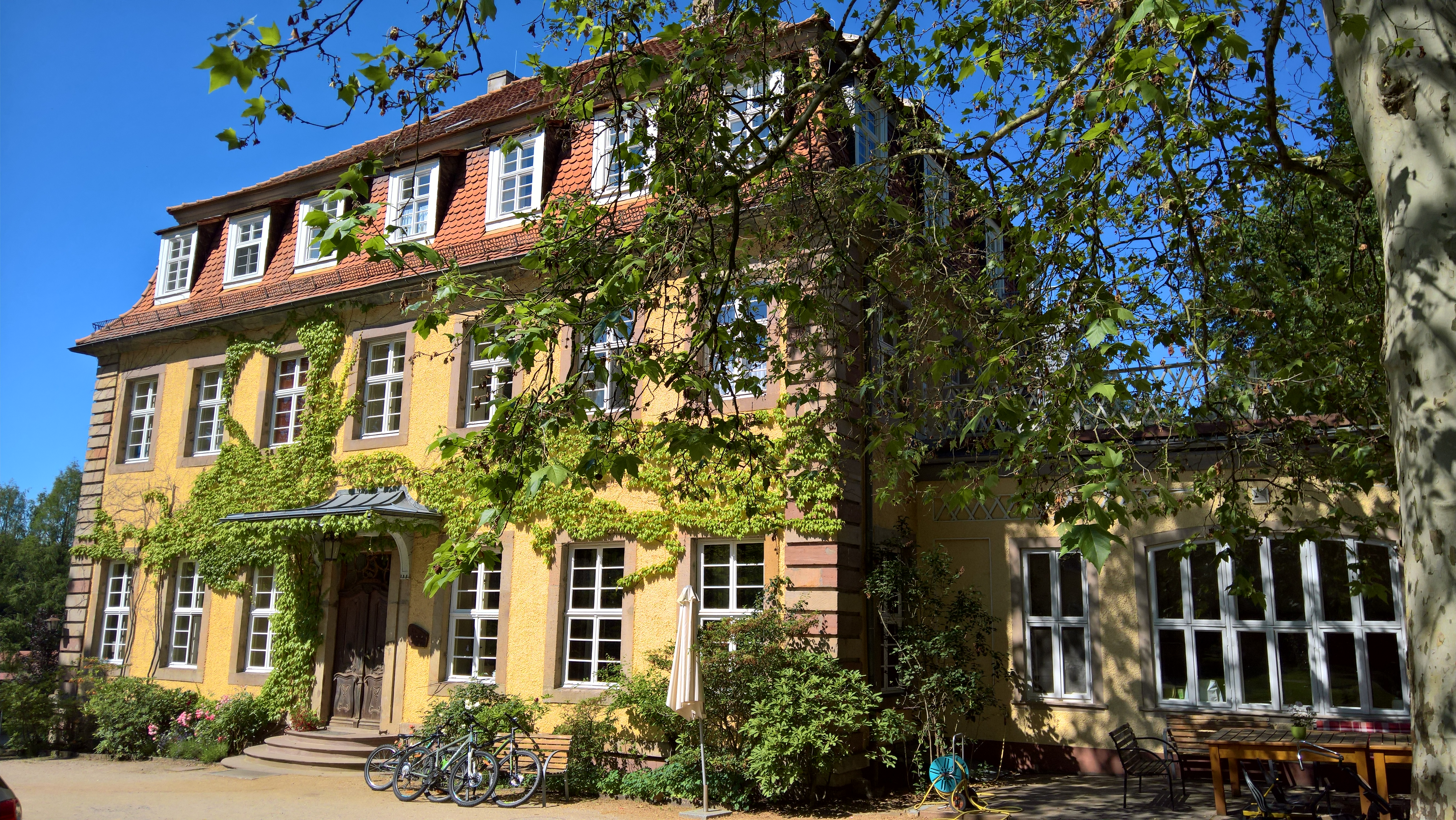 Ehemaliges Jagdschloss Richthof